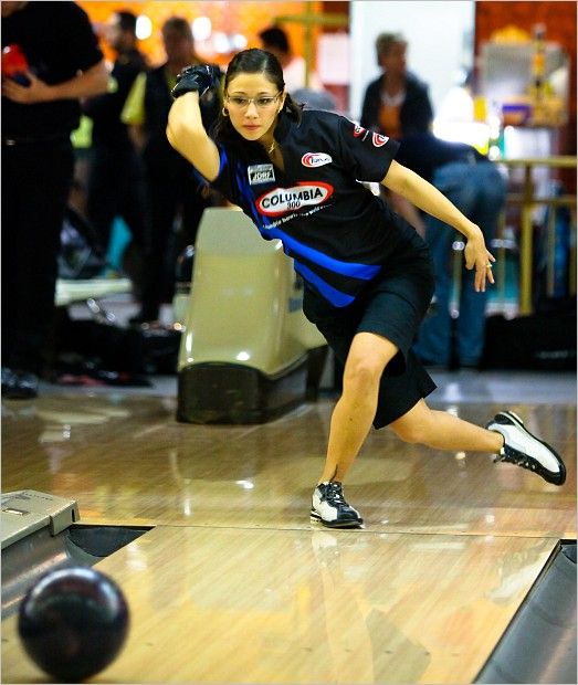 Bolichera Colombia